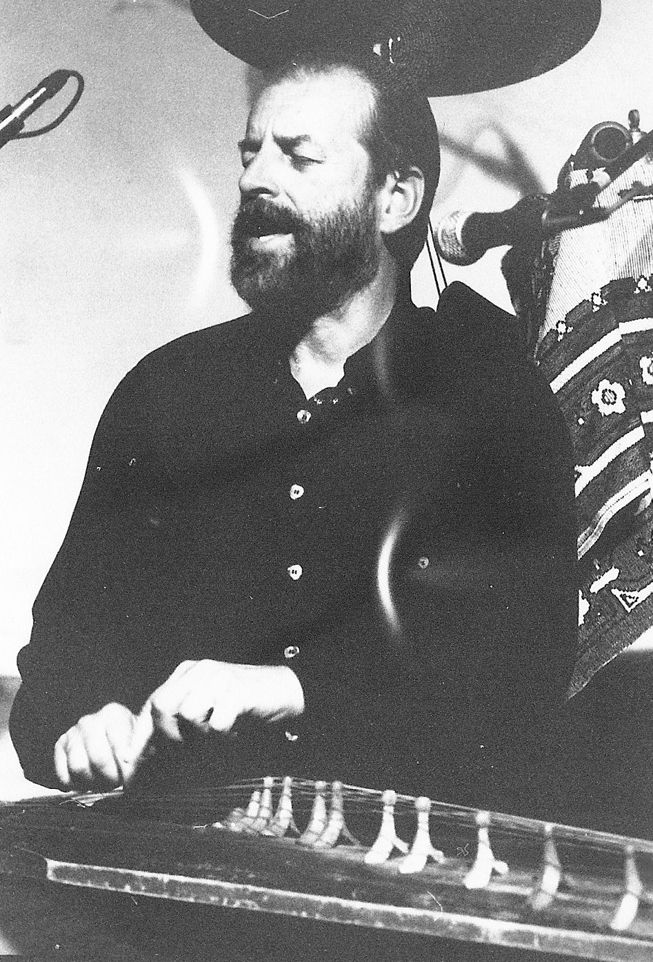 Jacek Ostaszewski